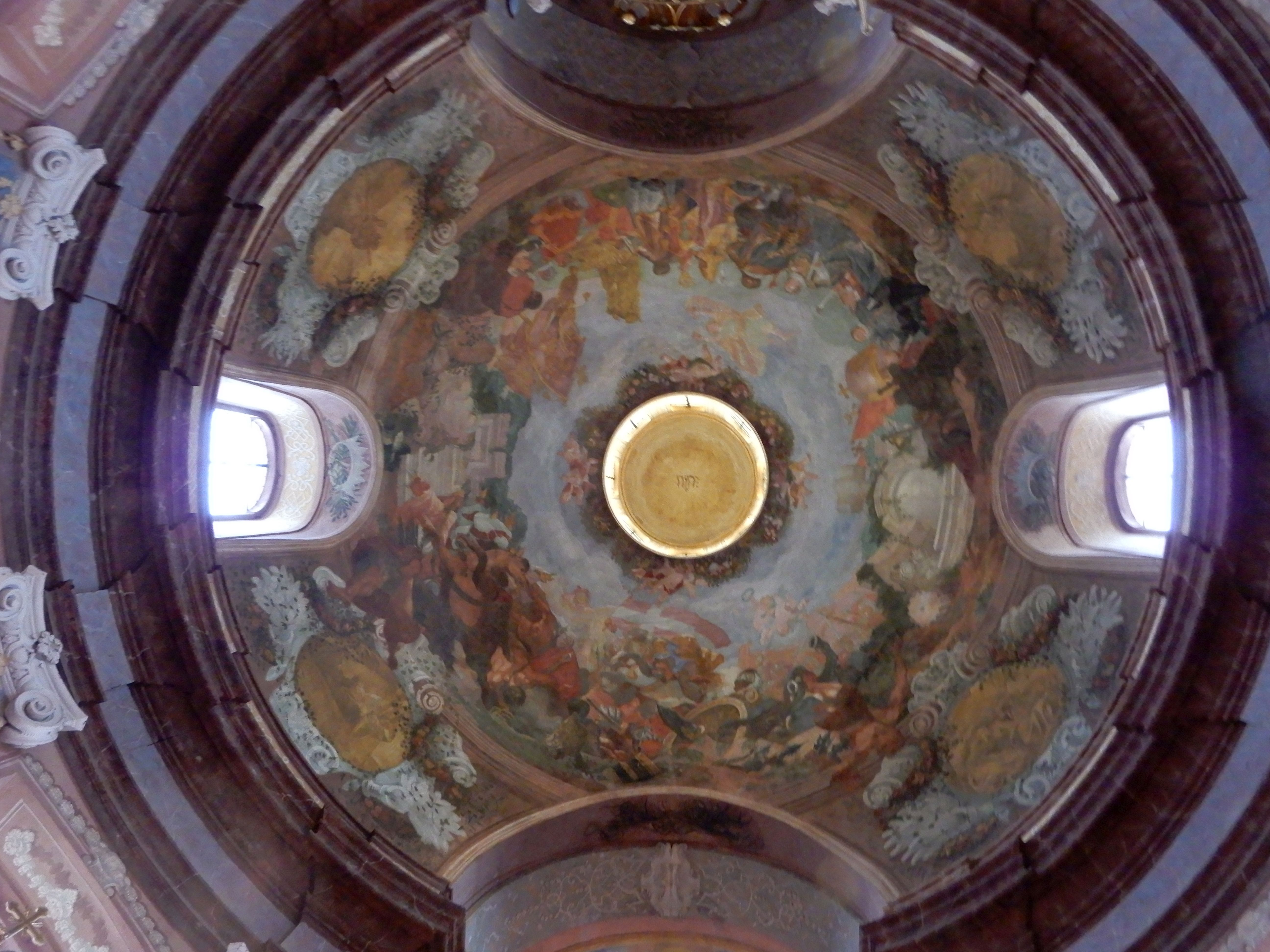 Kunratice (Praha), kostel sv. Jakuba Většího, barokní malba v kupoli